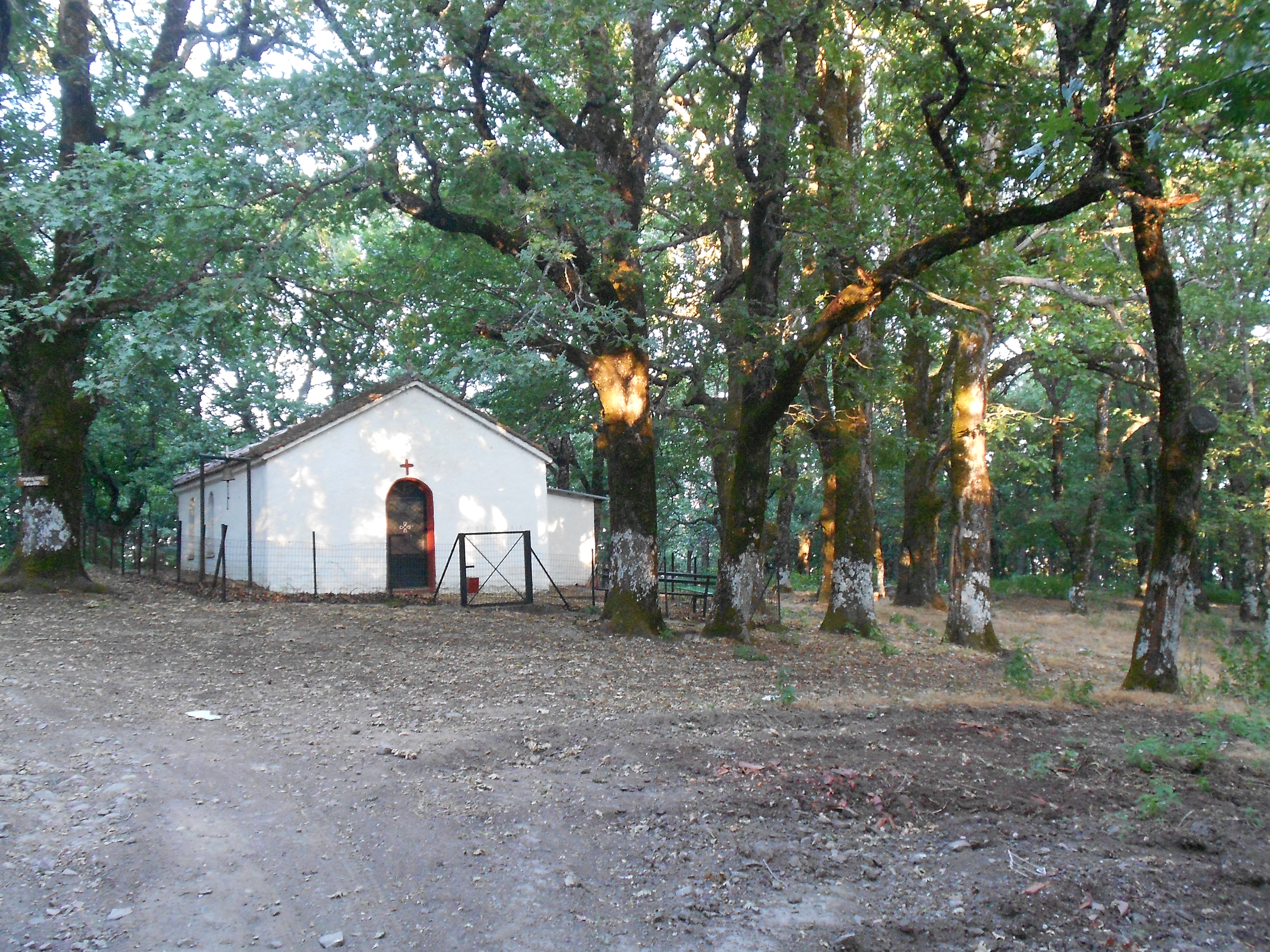 Εκκλησάκι στην κορυφή του όρους Τελέθριου